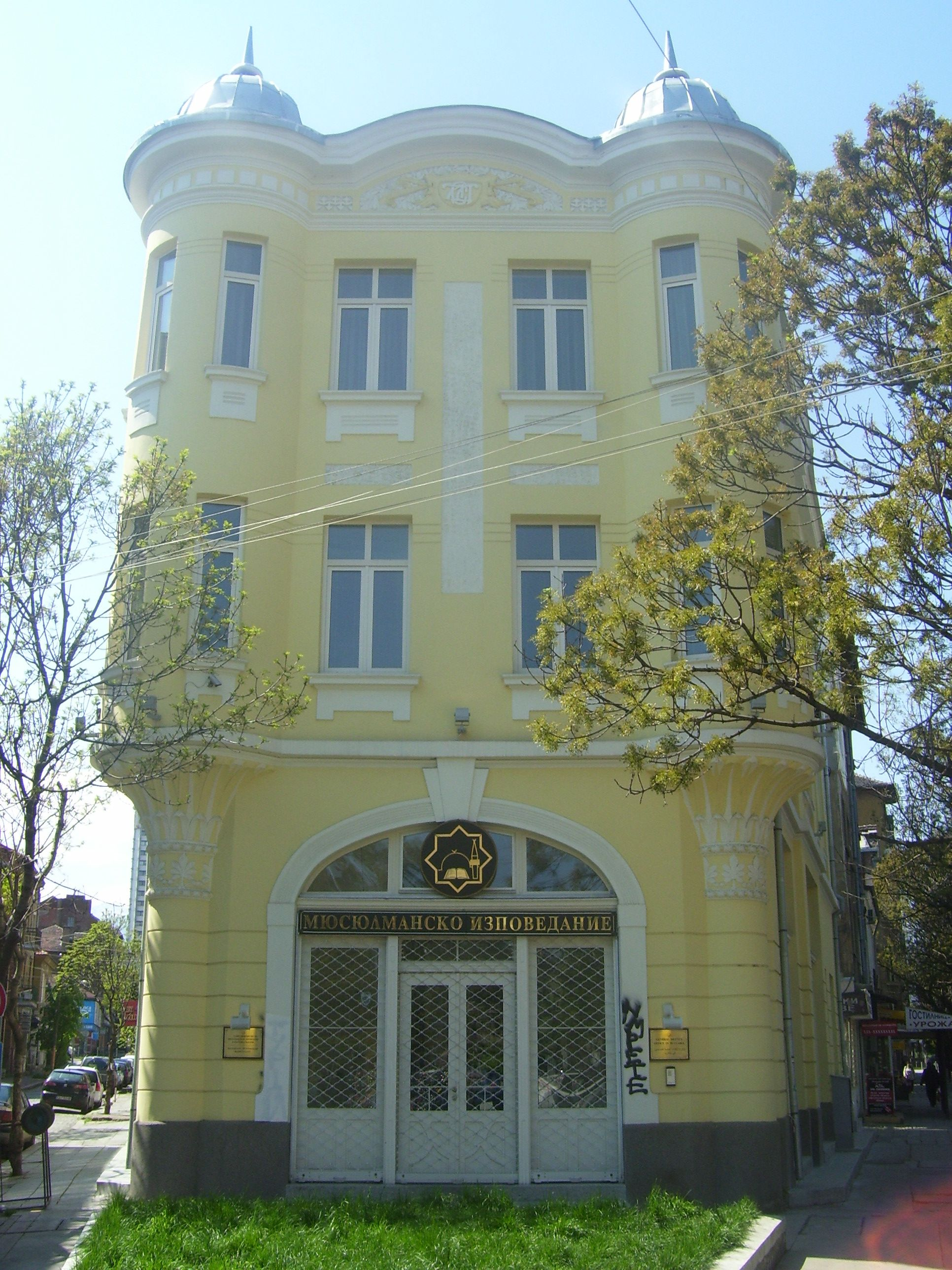 Сградата на Главното мюфтийство в София, България.